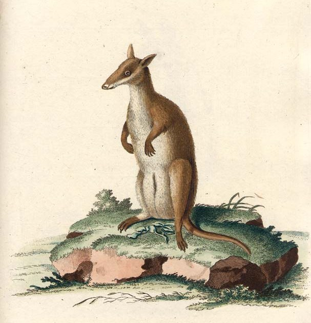 Thylogale brunii, plate from Schreber, Johann Christian Daniel von, Histoire naturelle des quadrupèdes représentés d´après nature. Tome III. Le phoque, le chien, le chat, le putois, la loutre, la marte, l'ours, le didelphe, la taupe, la souris, le hérisson A Erlang, chez Wolfgang Walther, 1780